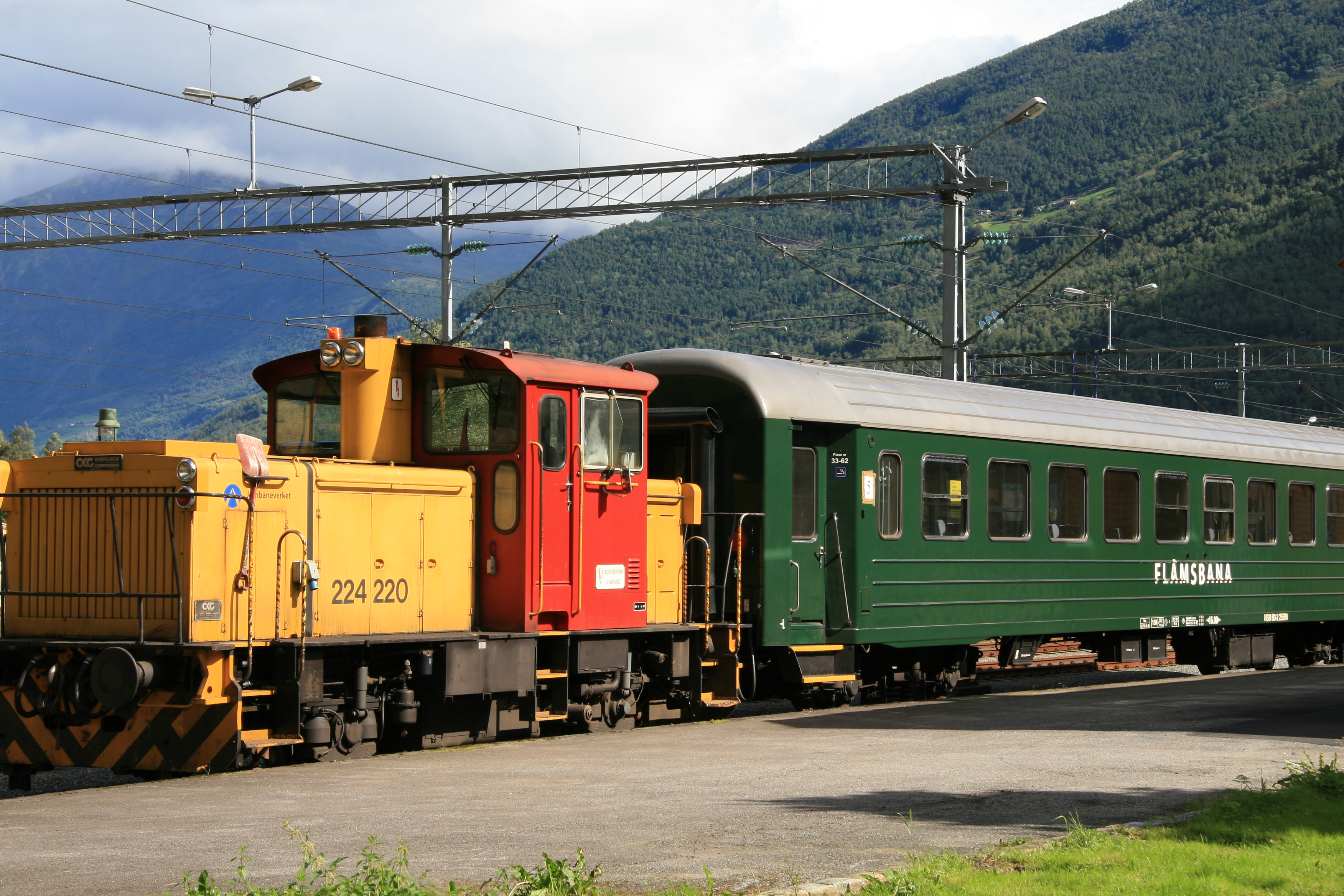 Tog på Flåm stasjon